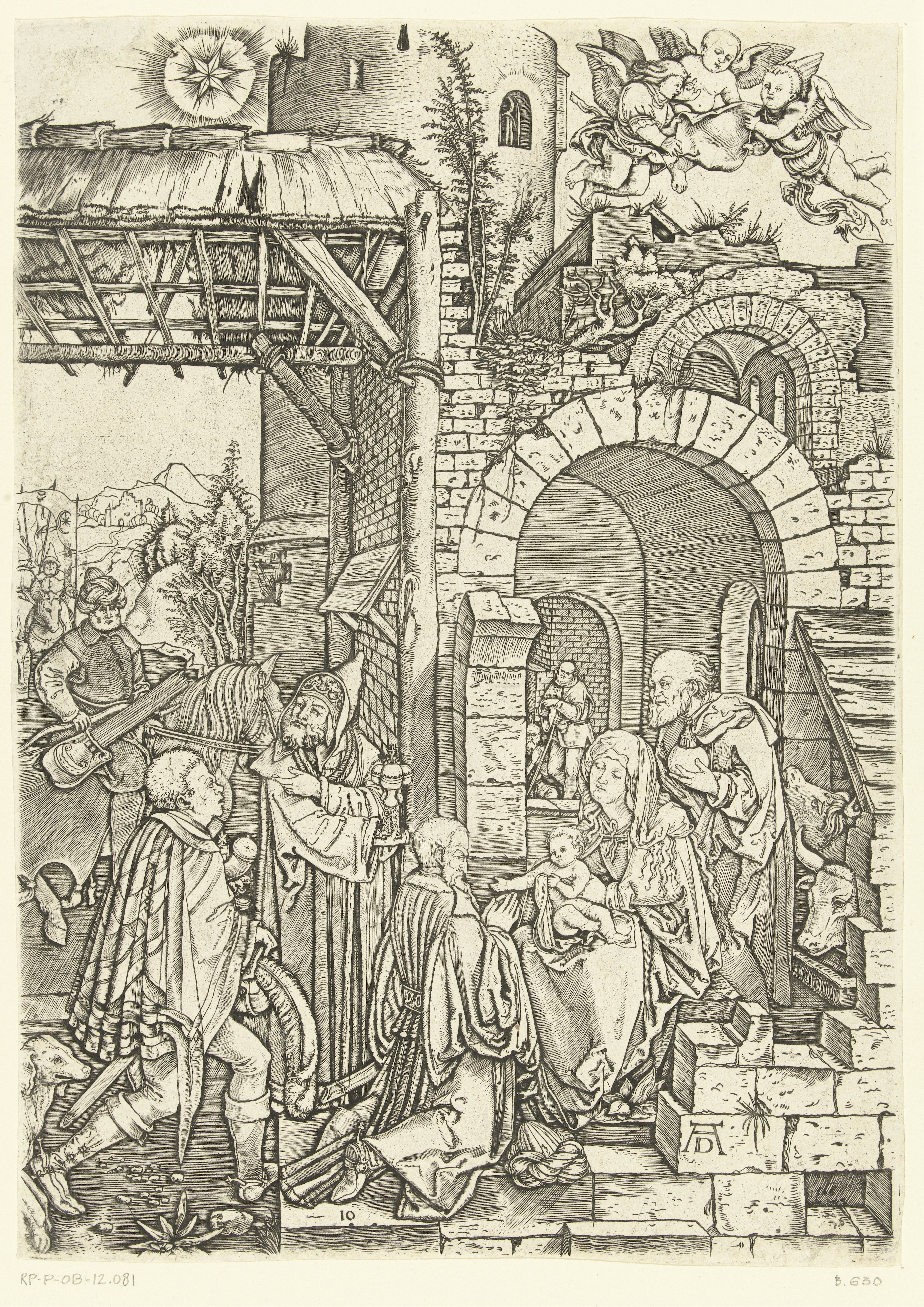 IdentificatieTitel(s): Aanbidding van Christus door drie koningenLeven van Maria (serietitel)Objecttype: prent Serienummer: 10/17Objectnummer: RP-P-OB-12.081Catalogusreferentie: The Illustrated Bartsch 287-C1Opmerking: kopie naar DürerBartsch 630VervaardigingVervaardiger: prentmaker: Marcantonio Raimondinaar prent van: Albrecht Dürer (vermeld op object)Plaats vervaardiging: ItaliëDatering: 1510 - 1515Fysieke kenmerken: gravureMateriaal: papier Techniek: graveren (drukprocedé)Afmetingen: blad: h 294 mm × b 210 mmToelichtingKopie naar houtsnede van Albrecht Dürer. Prent maakt deel uit van serie met zeventien prenten over het leven van Maria.OnderwerpWat: adoration of the kings: the Wise Men present their gifts to the Christ-child (gold, frankincense and myrrh)Verwerving en rechtenVerwerving: onbekendCopyright: Publiek domein